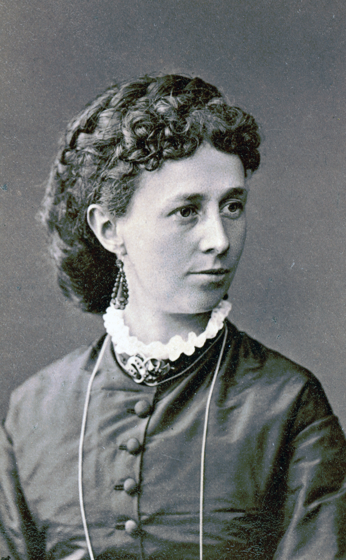 Clementine Swartz, skådespelare vid Kungliga teatern 1870